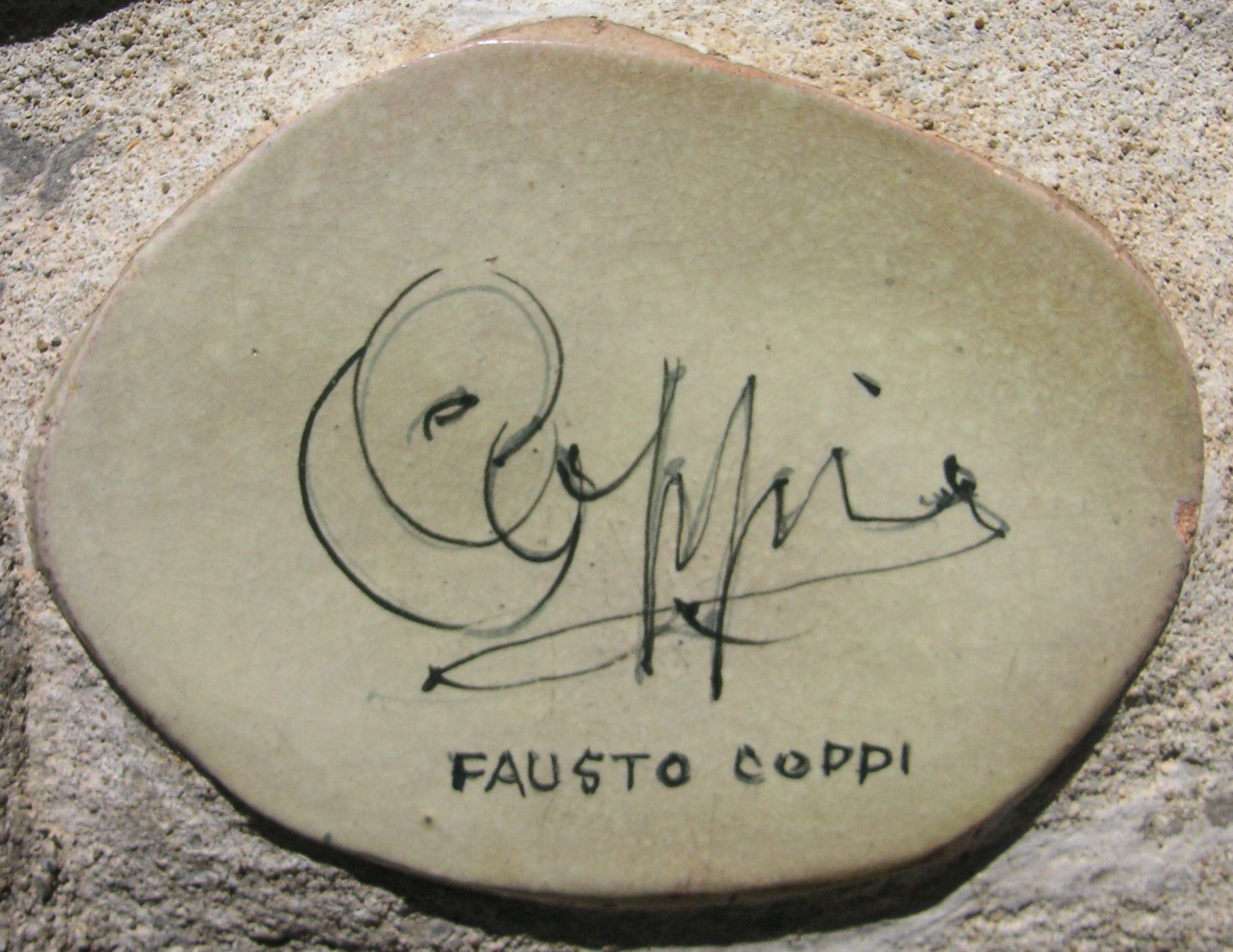 Piastrella con l'autografo di Fausto Coppi sul muretto di Alassio.